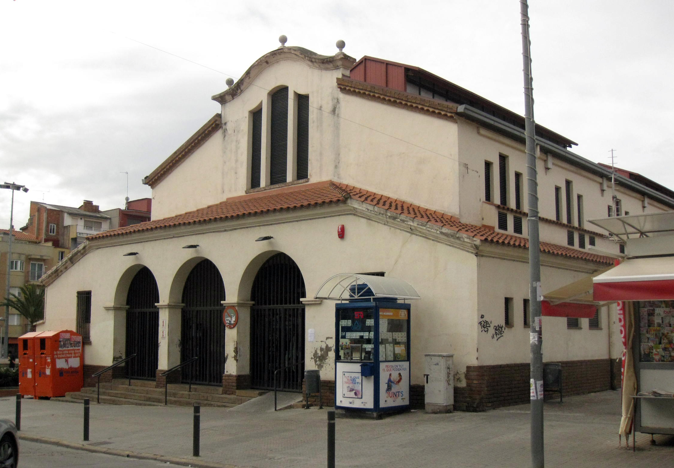 Mercat municipal (Olesa de Montserrat) Object location41° 32′ 34.05″ N, 1° 53′ 36.52″ E